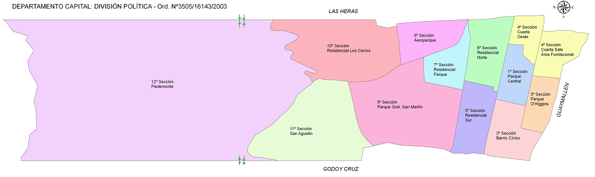 Mapa de la Ciudad de Mendoza con sus doce secciones.